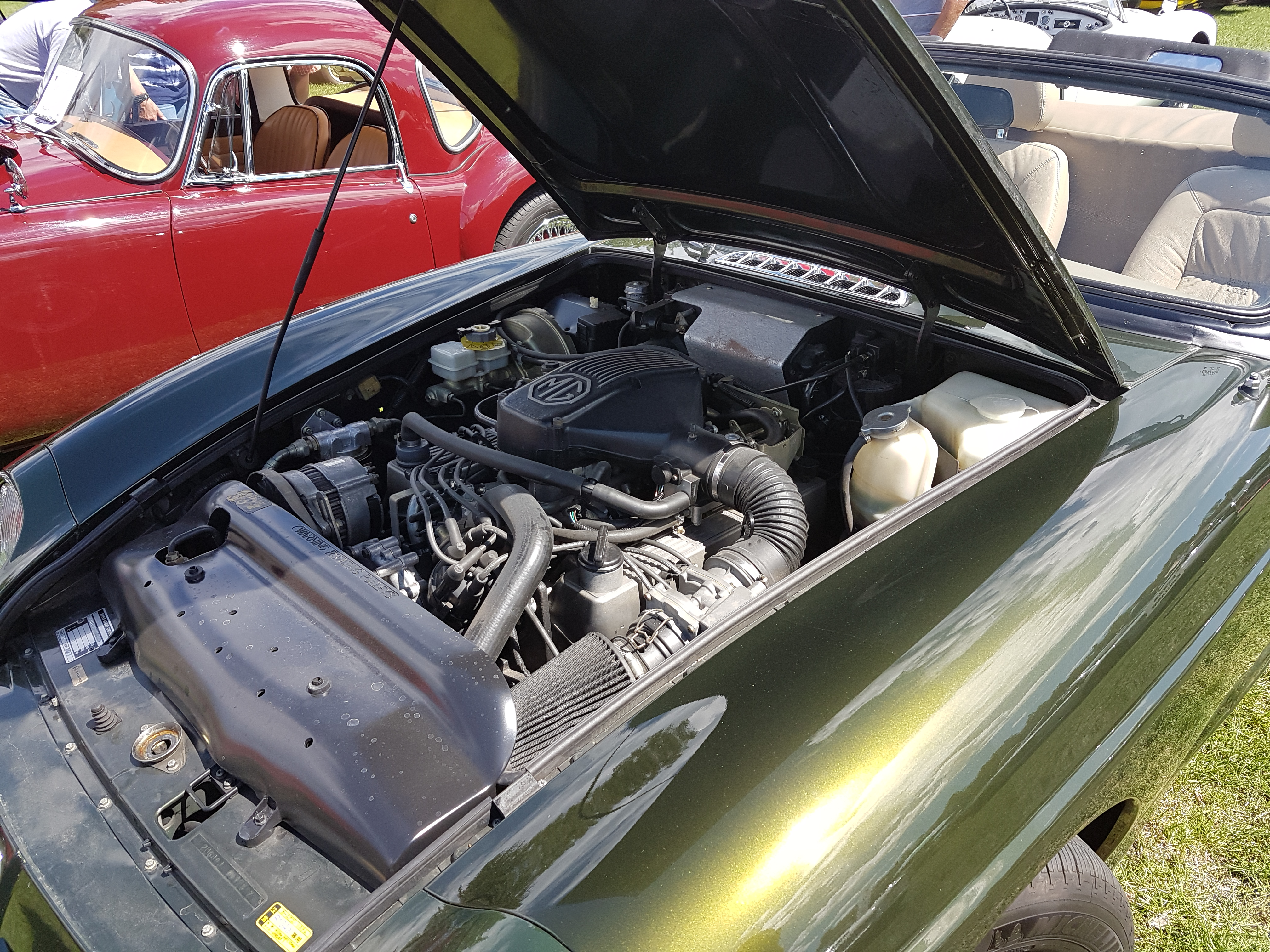 MG RV8 - V8 engine